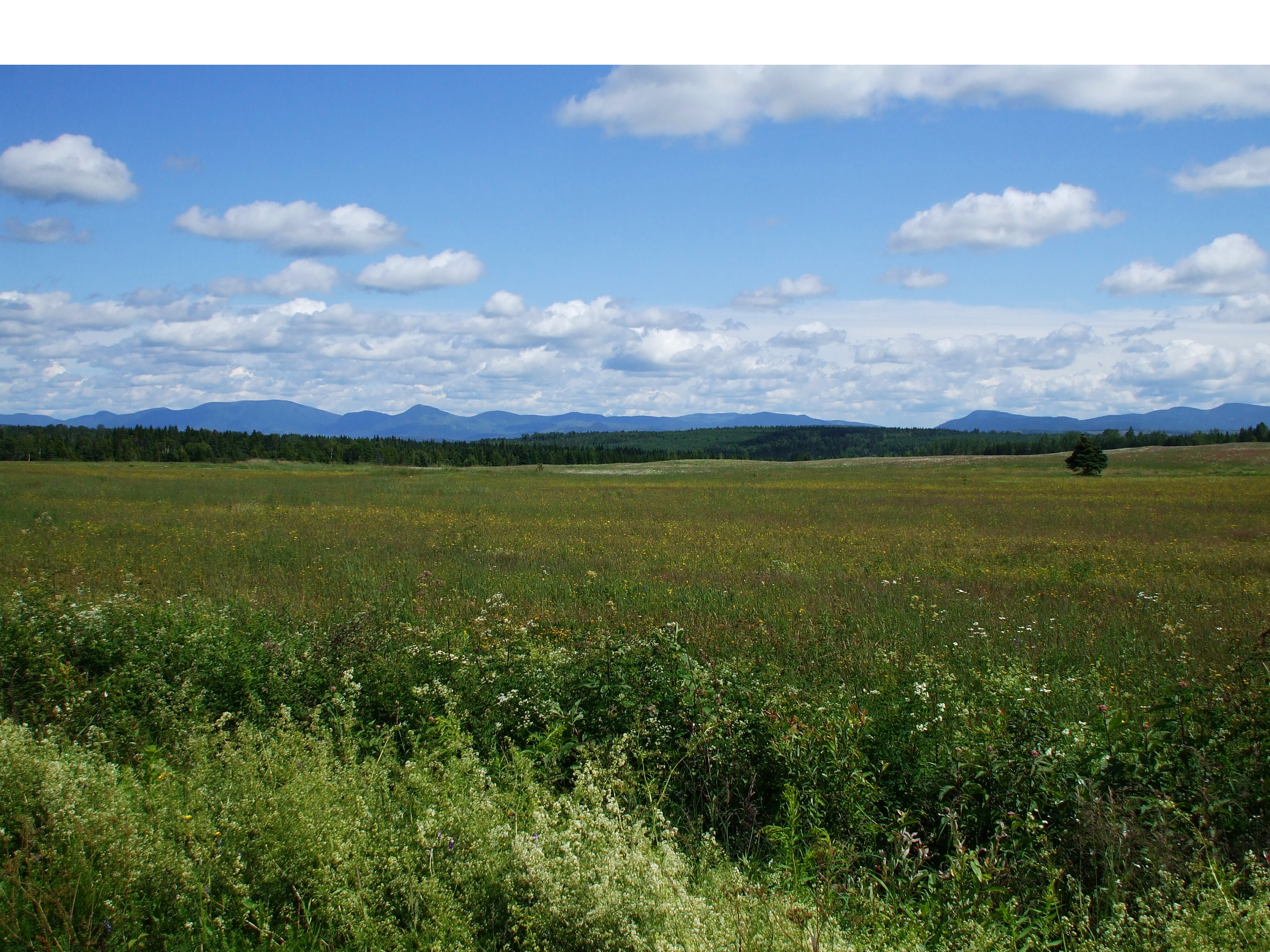 Paysage, Saint-Jean-de-Cherbourg